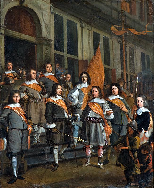 De schutters van het St. Sebastiaansgilde staan afgebeeld voor hun eigen gebouw, de doelen. De schilder heeft zich daarbij enige artistieke vrijheden veroorloofd, aangezien het gebouw nooit zo rijk versierd is geweest.